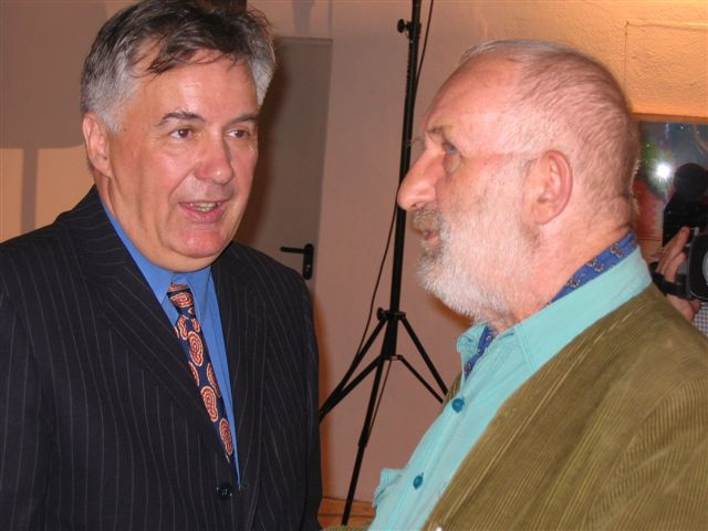 Andrzej Dudziński (b. 1945), Polish painter and Henryk Waniek (b. 1942), Polish essayist and painter